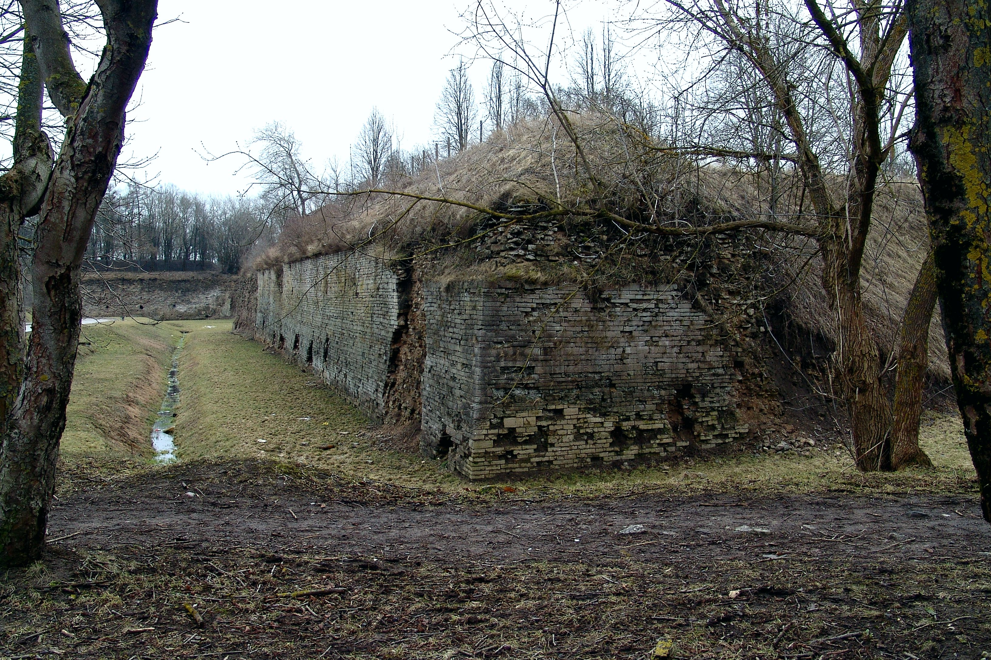 Бастион Гонор